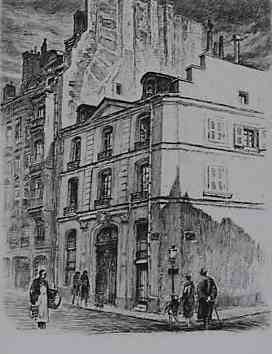 Vue de l'hôtel Daru, 79 rue de Lille à Paris (7e arrondissement). Résidence parisienne de Stendhal, protégé de la famille Daru, en 1800.